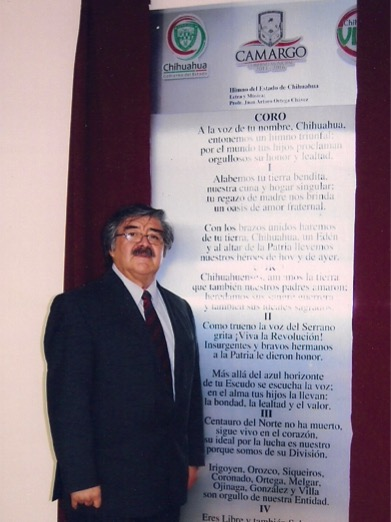 Juan Arturo Ortega Chavez 2